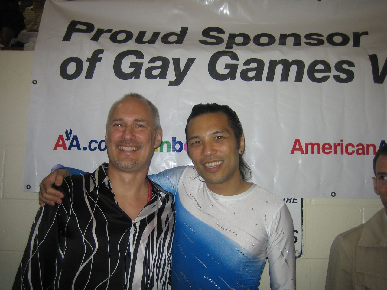 Team SF members Alan & Johnny